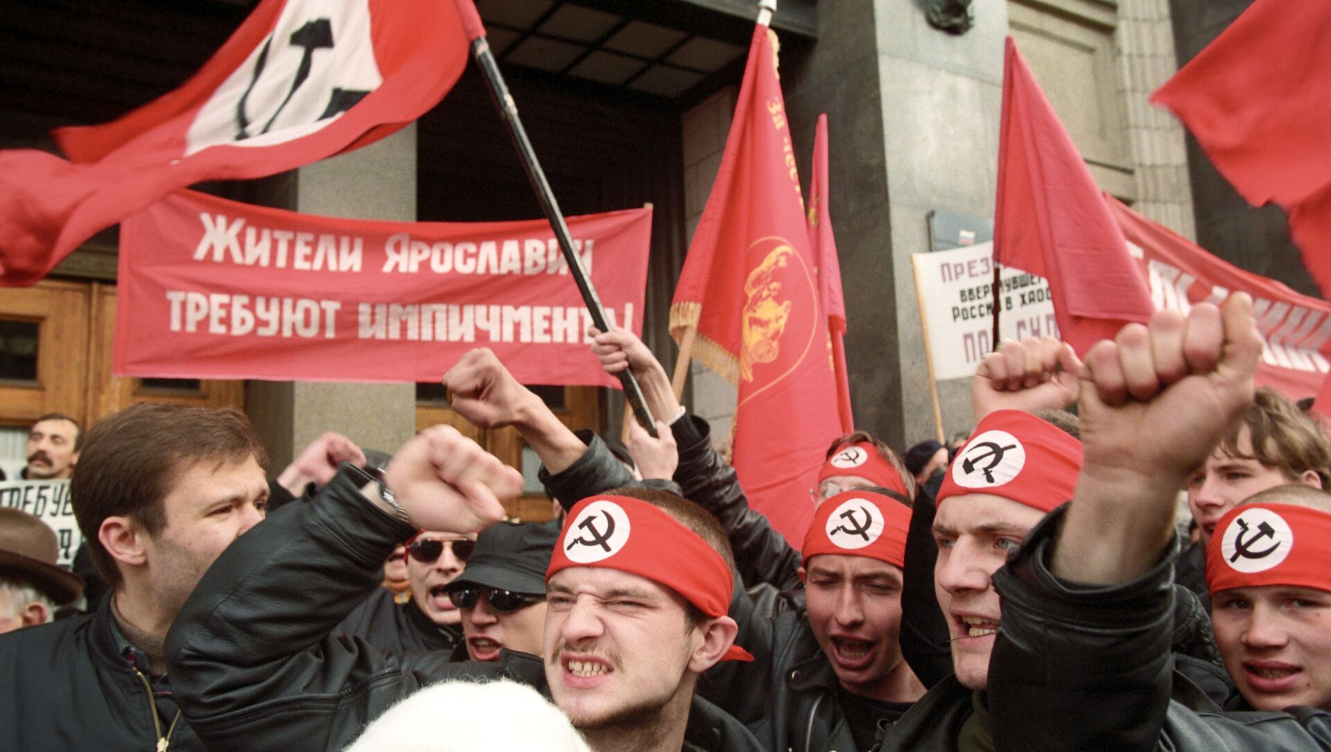 Пикет нацболов у здания Государственной Думы во время рассмотрения на пленарном заседании вопроса об импичменте Президенту России Б.Н.Ельцину. 15 мая 1999г. фото В.Ф.Федоренко